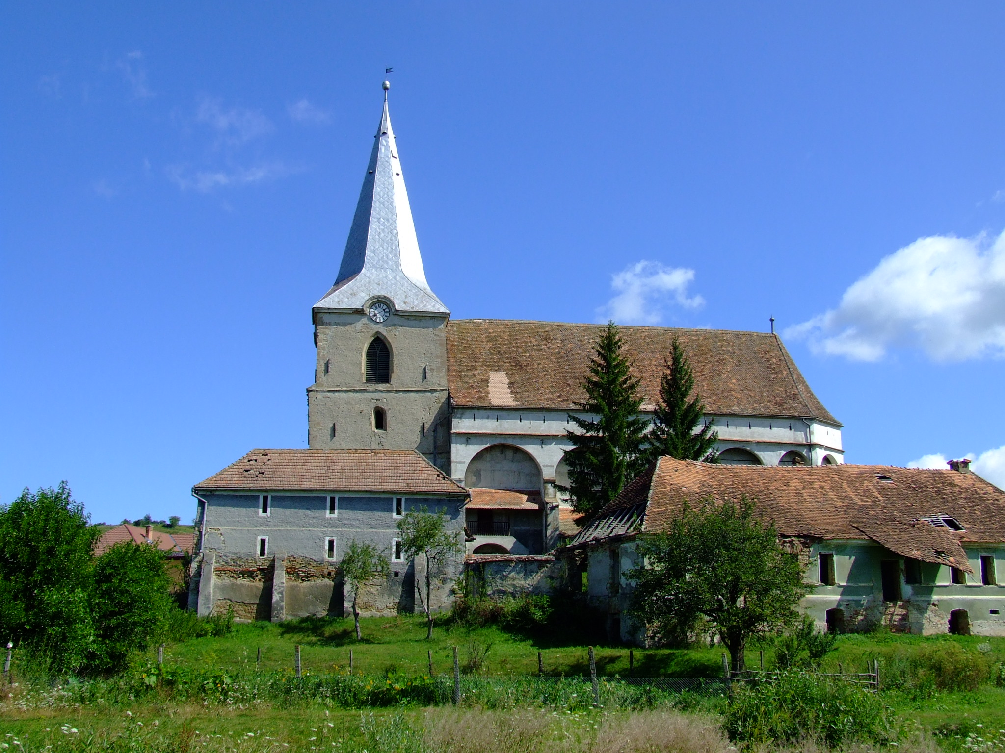 Biserica evanghelică fortificată Se observa si ruinele casei parohiale 01